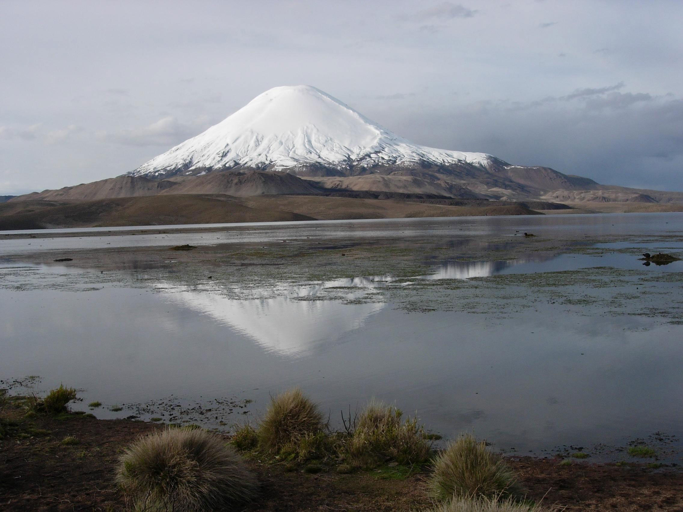 Blick auf den Vulkan Parinacota am Nachmittag, Spiegelung im See Logo Chungará